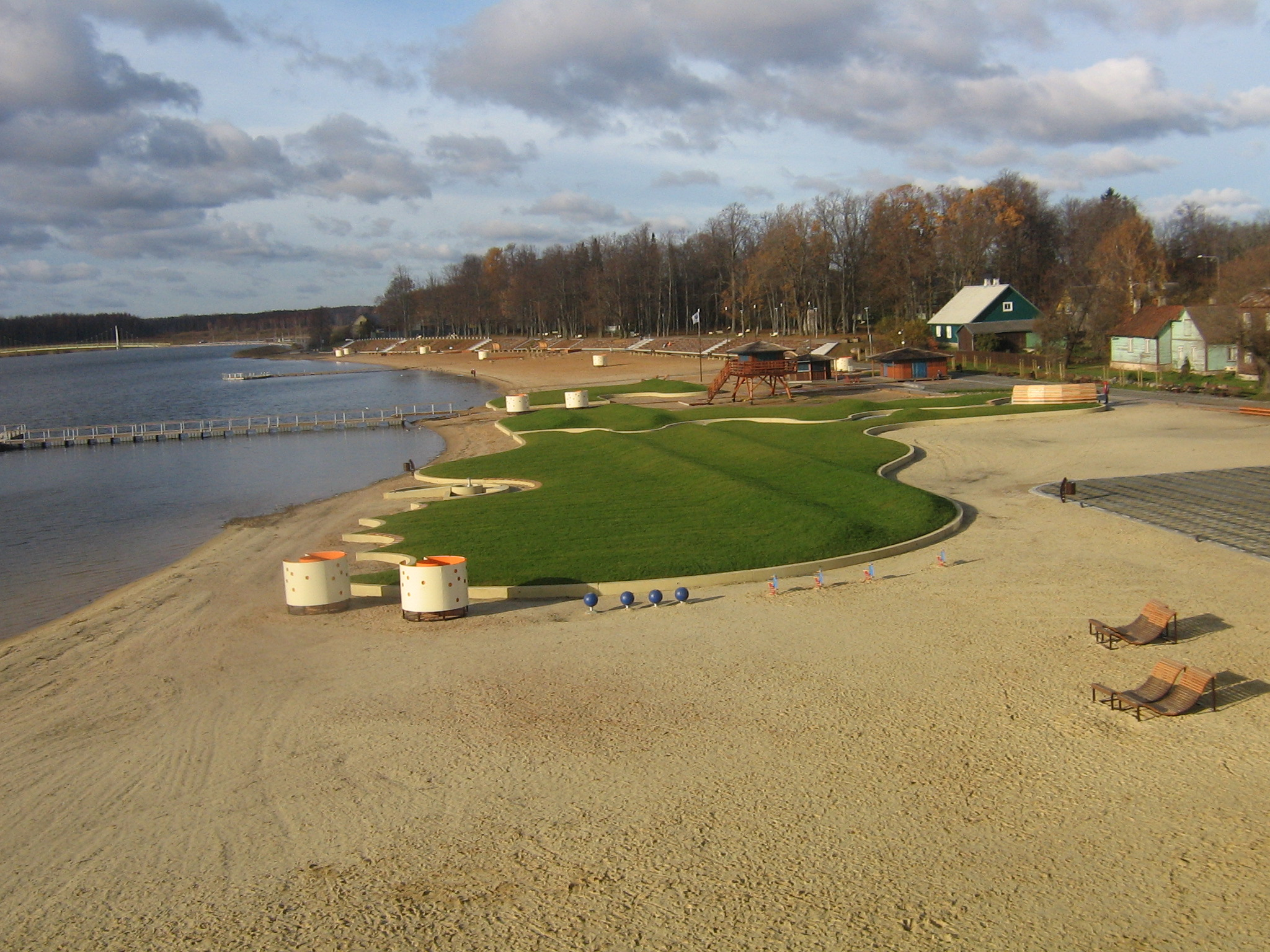 Võru rannapromenaad oktoober 2009